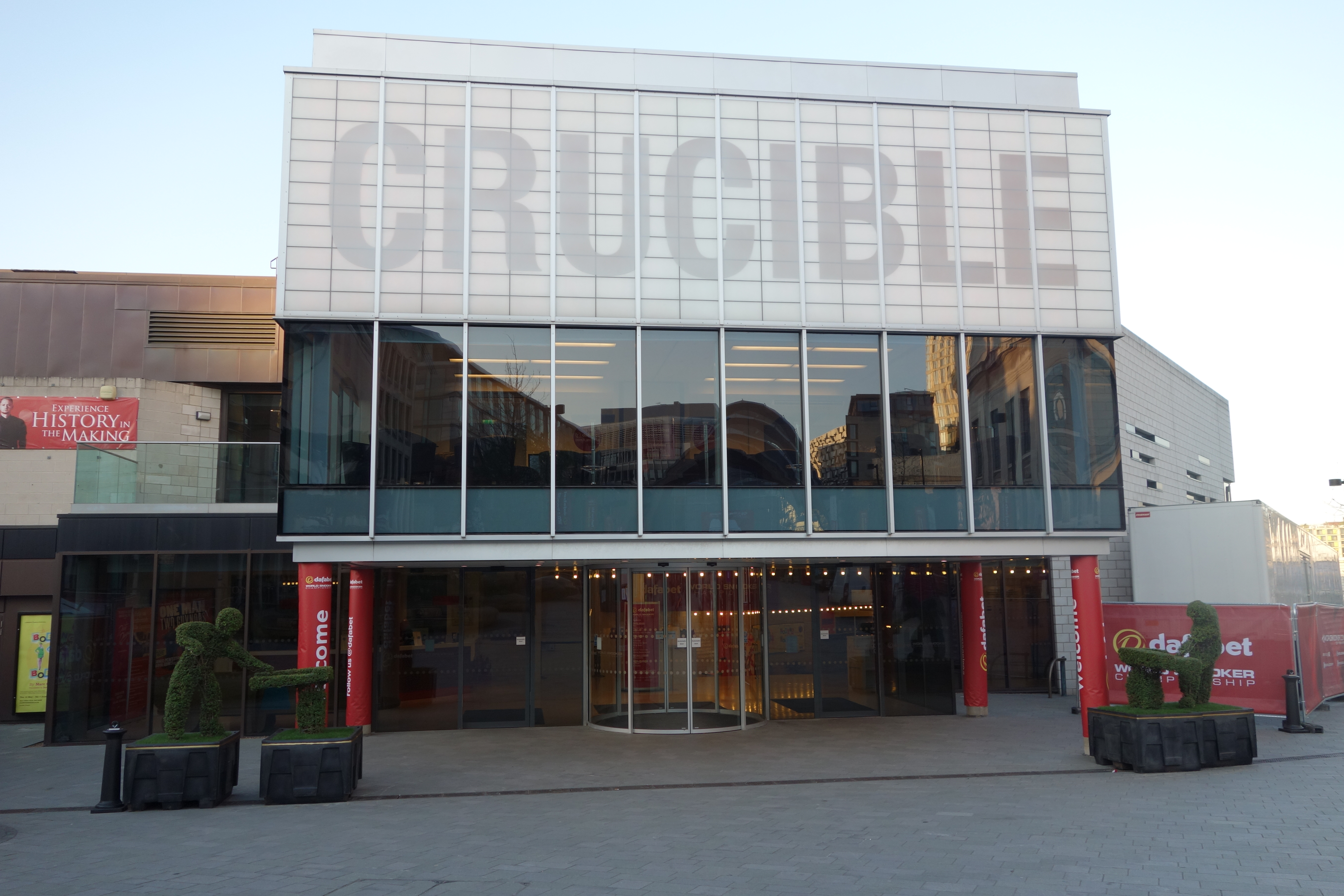 Crucible = Крусибл!